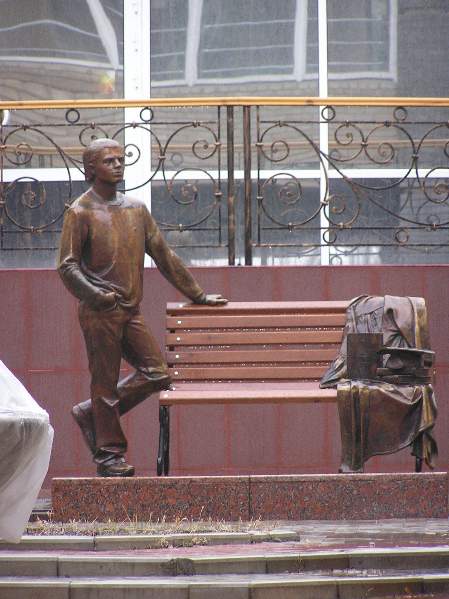 Донецк. Памятник студенту